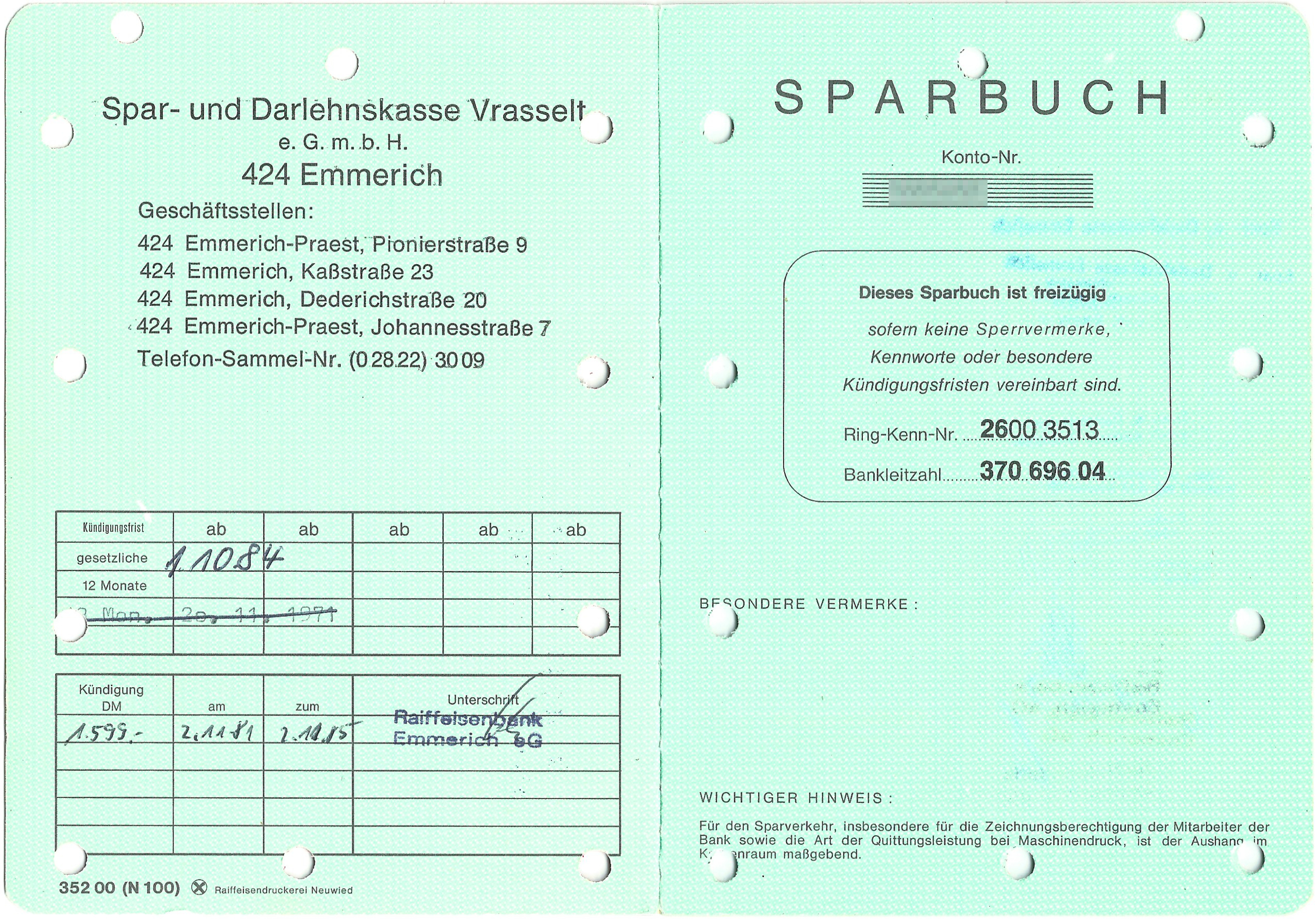 Sparbuch der Spar- und Darlehenskasse Vrasselt, Emmerich (später umbenannt in Raiffeisenbank Emmerich). Umschlagseite 2 mit den Kündigungsfristen und Seite 1